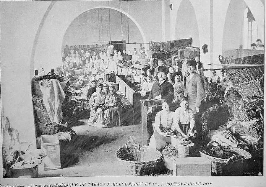 Ростов-на-Дону. Табачная фабрика Якова Семеновича Кушнарева. Построена по проекту и под наблюдением ростовского городского архитектора В. И. Якунина. Располагалась на углу Таганрогского проспекта и Пушкинской улицы. После прекращения производства здание использовалось как доходный дом, затем как гостиница «Палас-Отель». Сейчас – здание штаба Южного военного округа (дом 43). Крошка табака посредством пара.